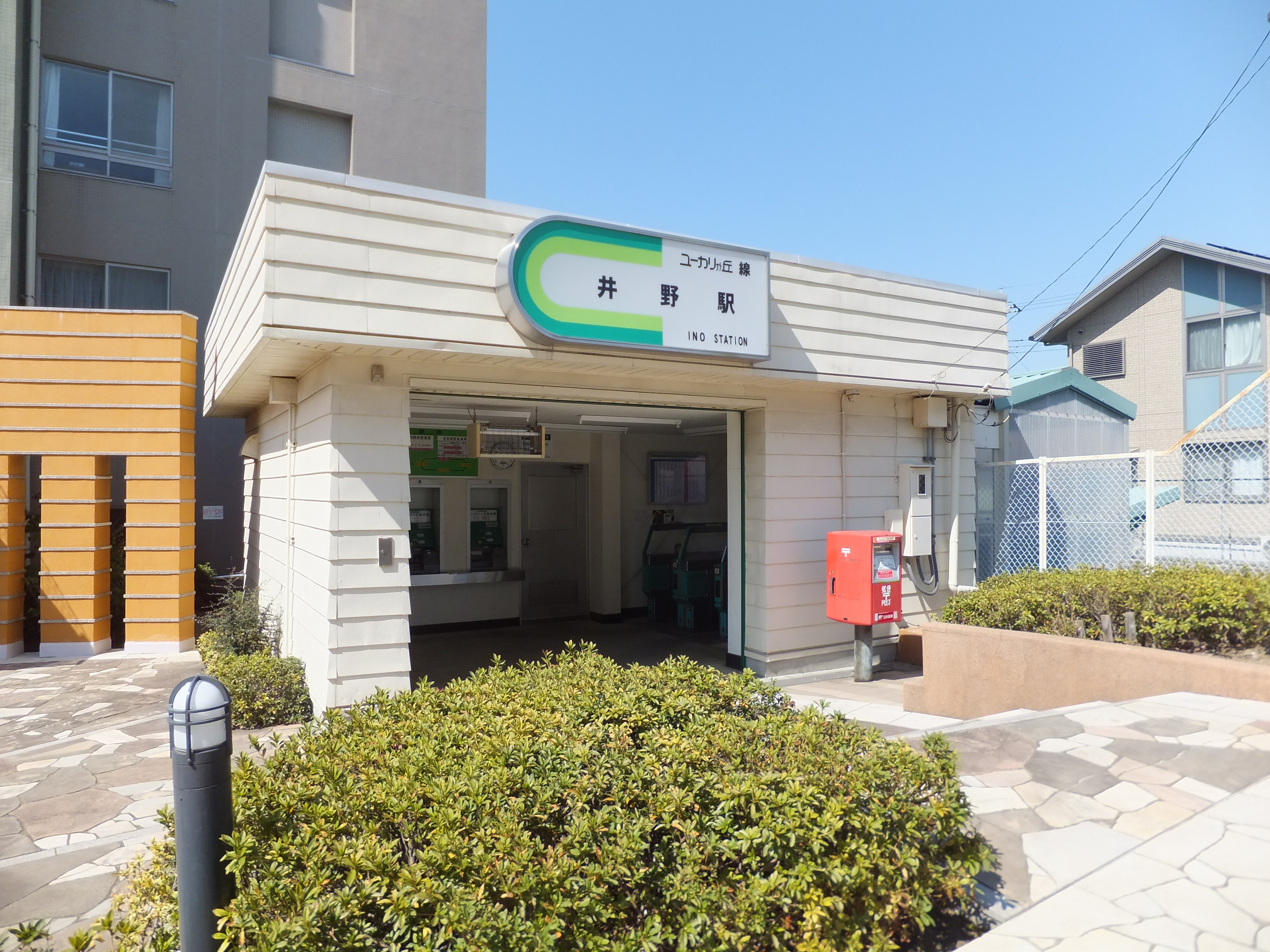 山万ユーカリが丘線井野駅。マンションに挟まれた広場に駅がある。